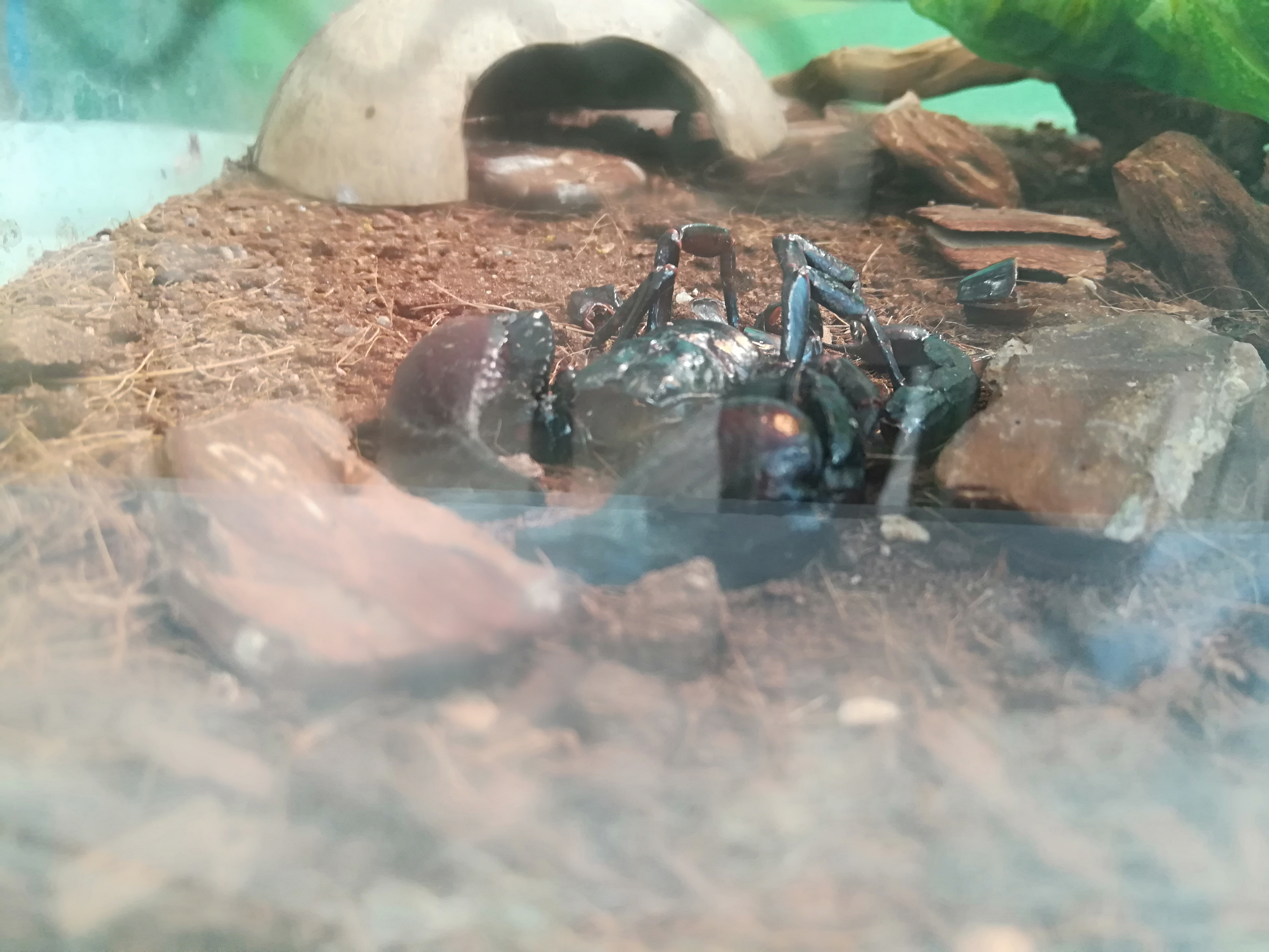 中文（中国大陆）: 亚洲雨林蝎（Heterometrus petersii）